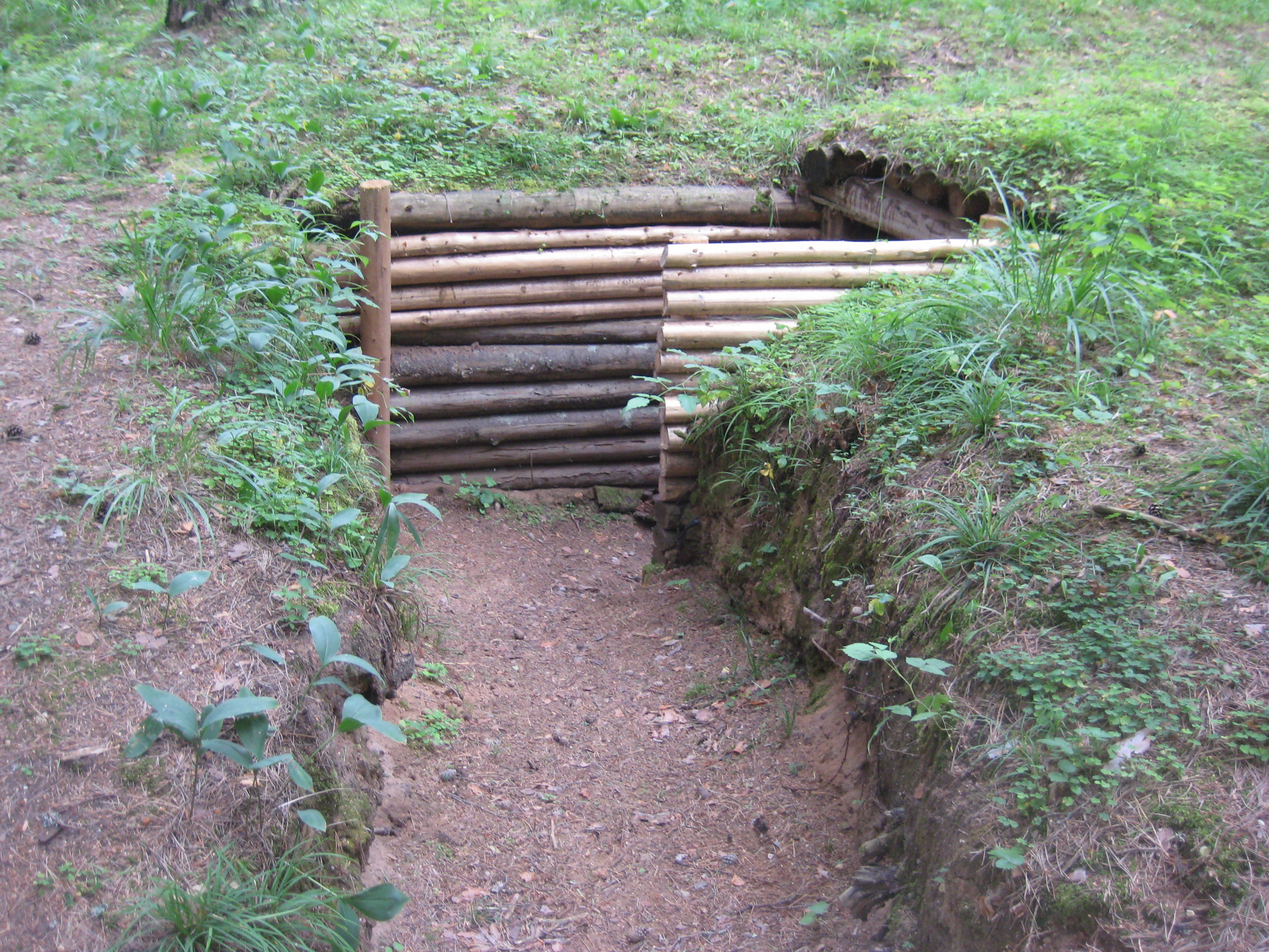 Obelių sen., Lithuania